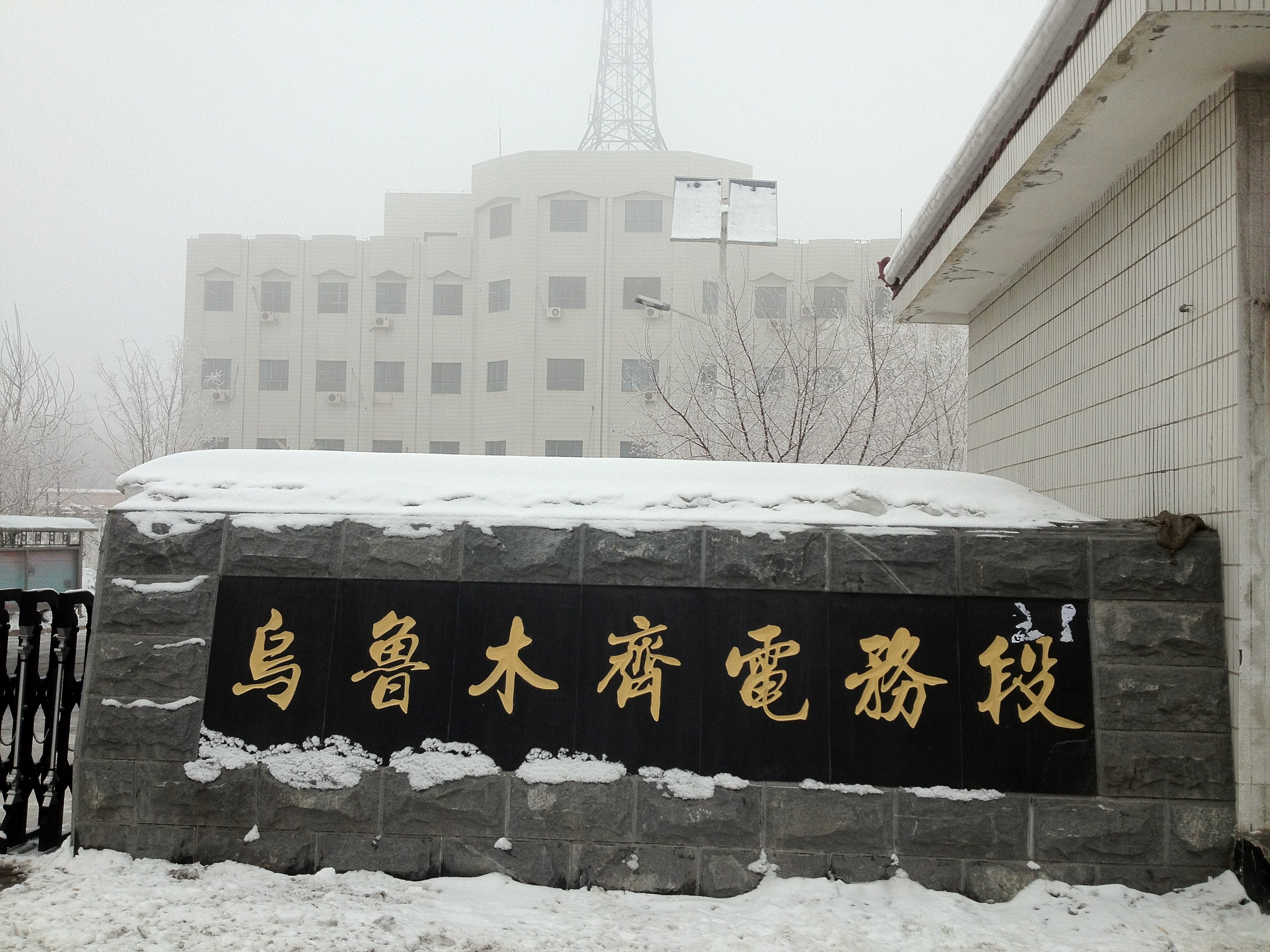 乌鲁木齐铁路局乌鲁木齐电务段